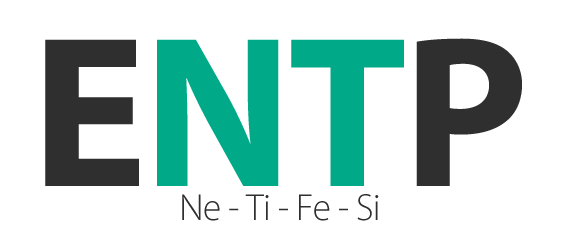 Logo ENTP MBTI.